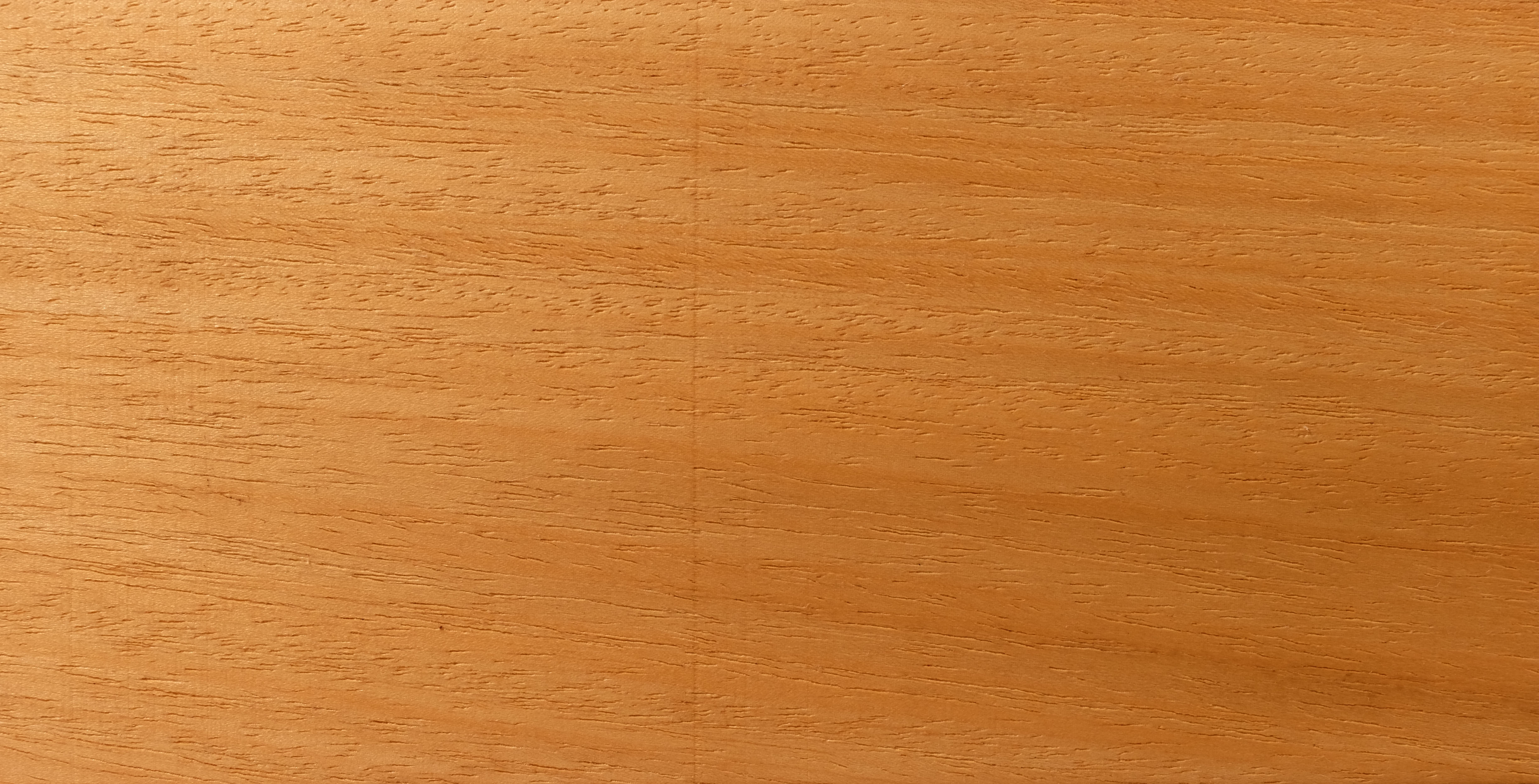 gemessertes Furnier; Holzart: ABA, Abachi, Ayous, Obeche, Samba, Wawa